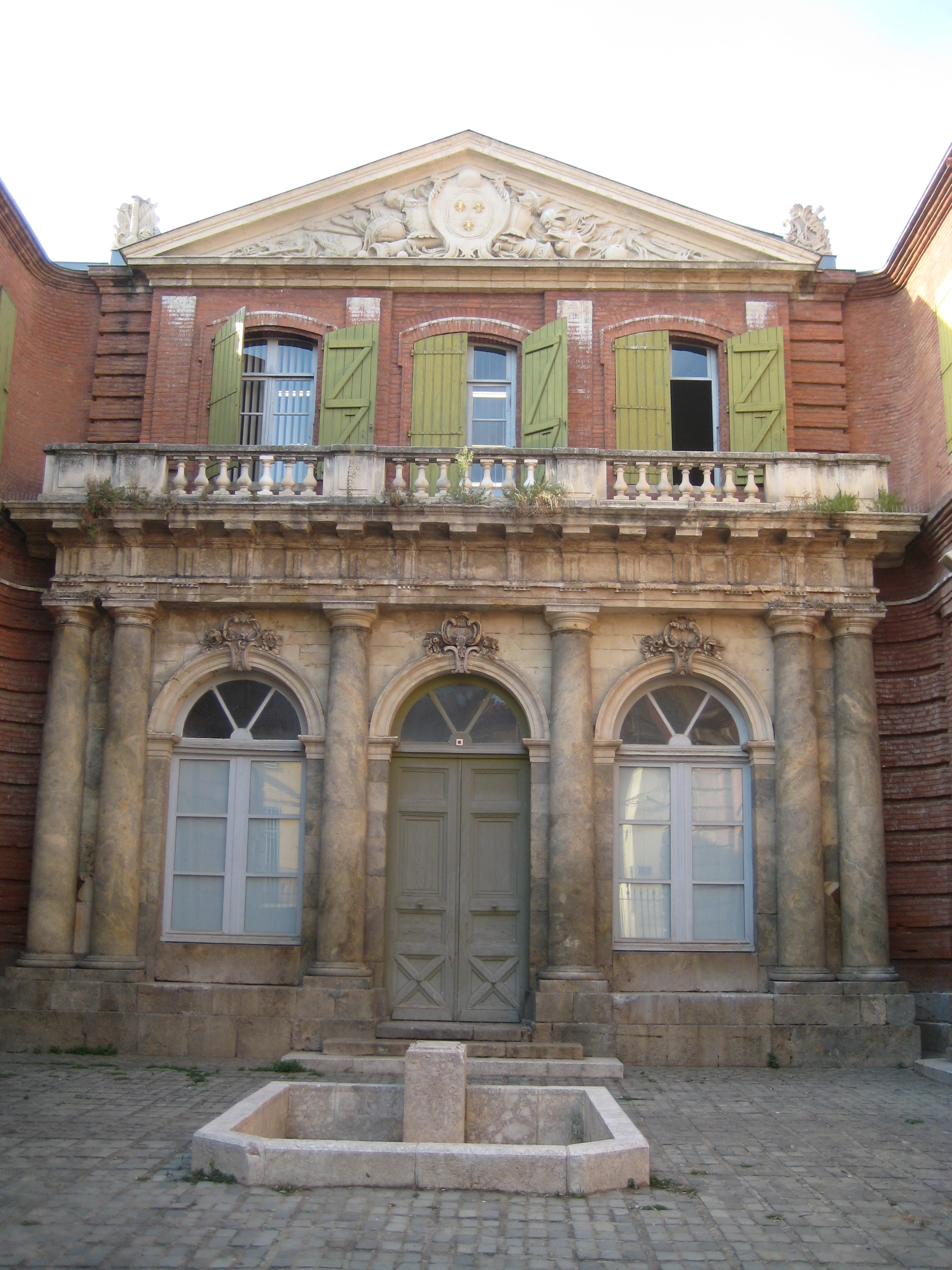 Ancienne Université de Perpignan, 1 rue du musée .